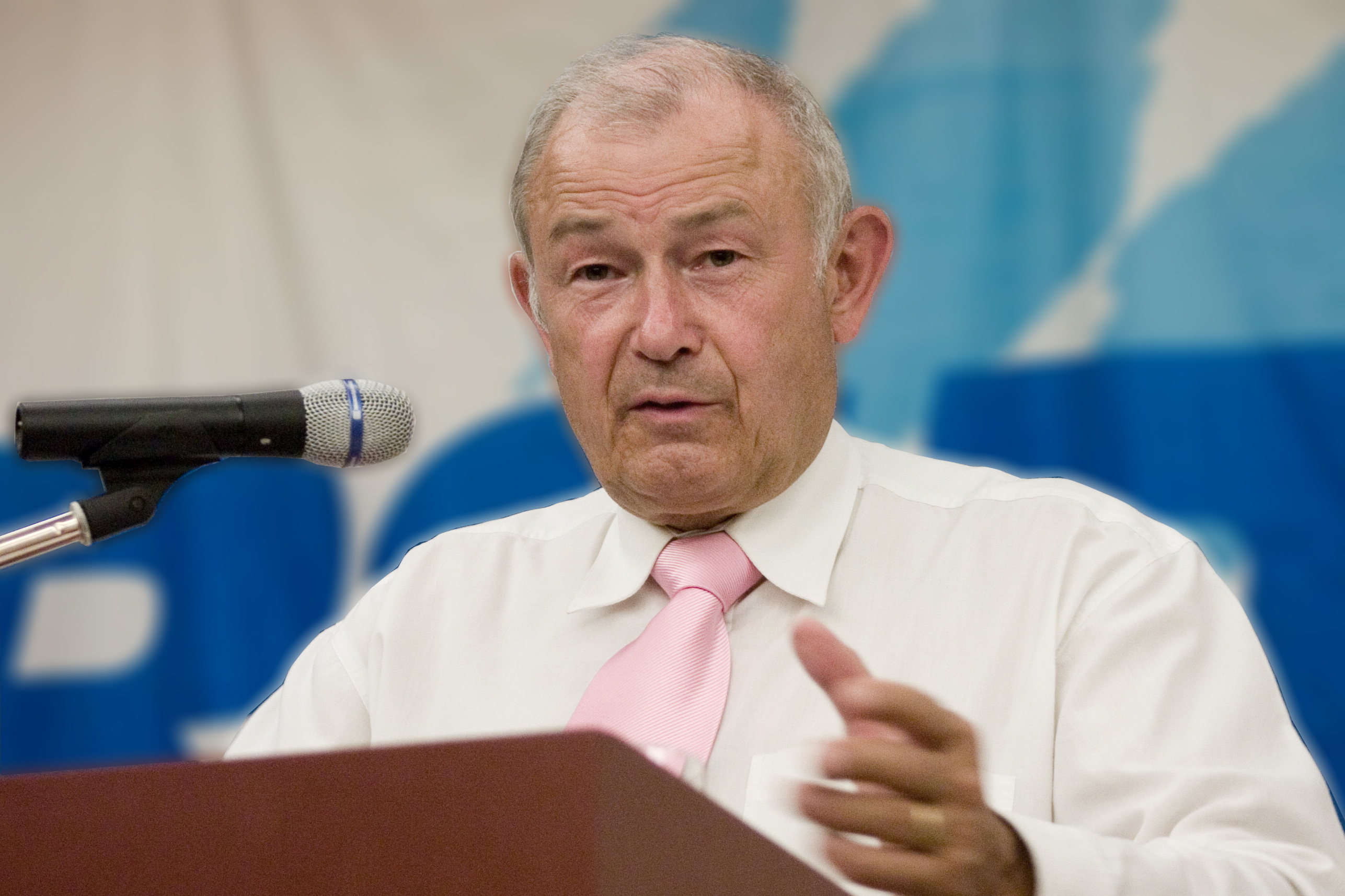 Dr. Günther Beckstein bei einem Diskussionsabend des RCDS in Würzburg